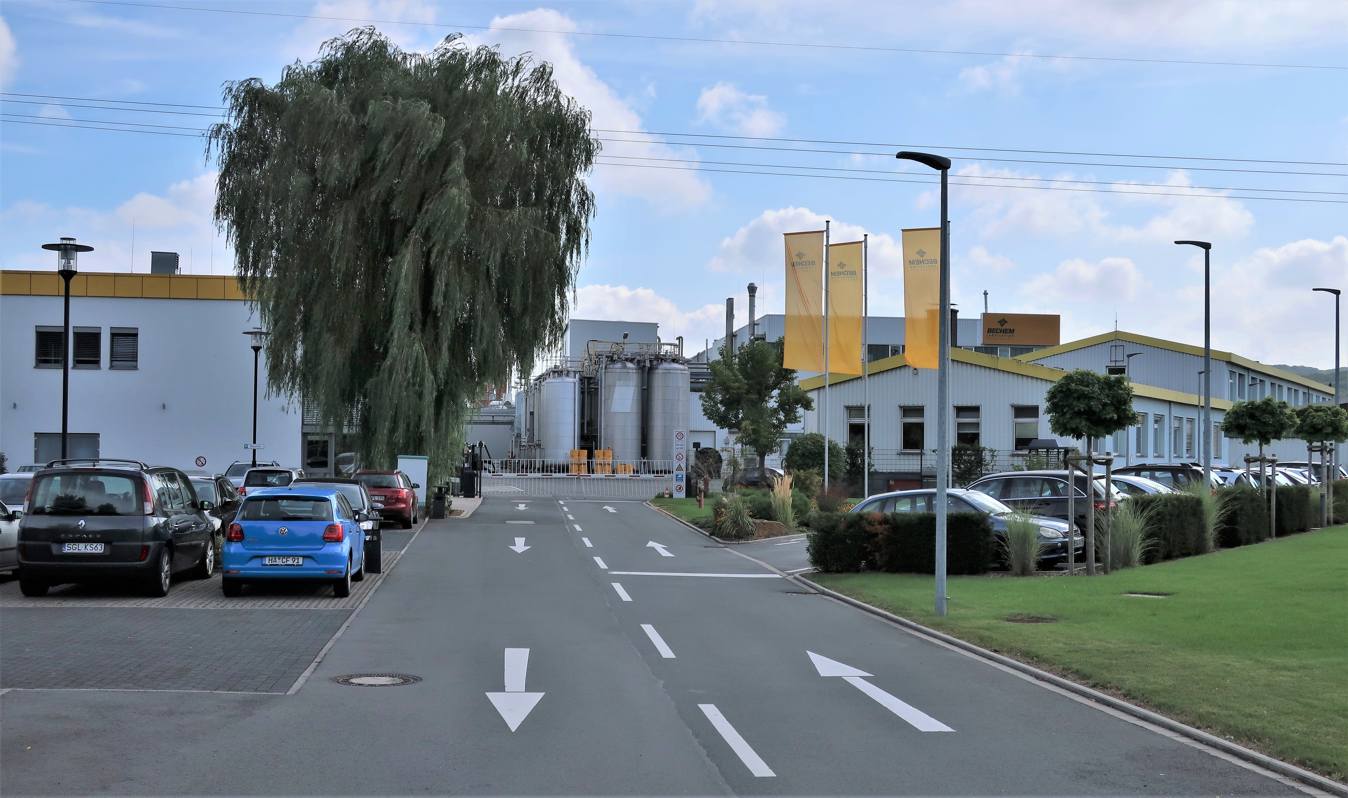 Carl Bechem GmbH (Schmierstoffe) in Hagen-Vorhalle, Weststraße 120. Im Jahre 1834 von Carl Bechem (1806-1891) gegründet. Erste deutsche Ölfabrik.